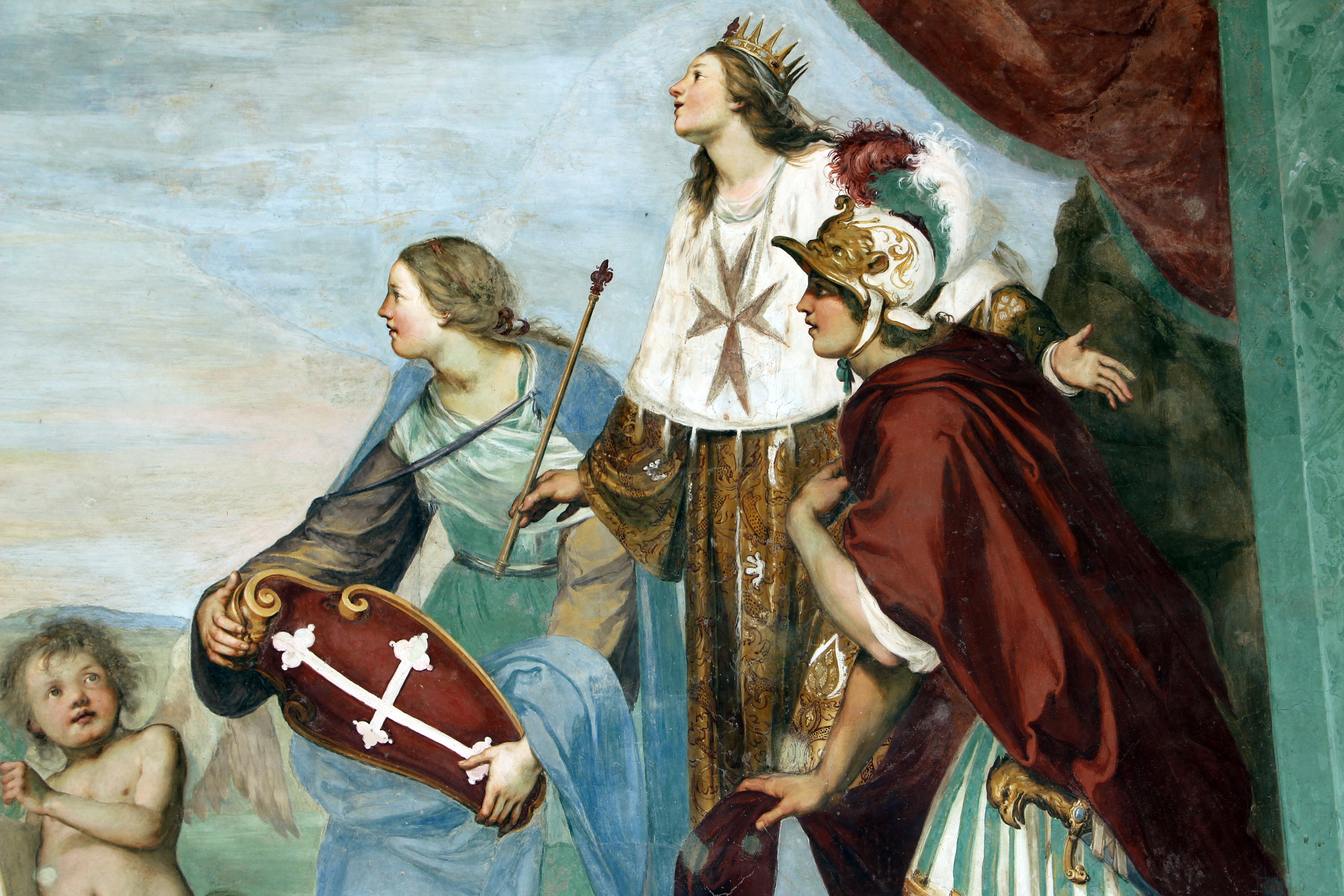 Villa medicea della Petraia - MIBAC The making of this document was supported by Wikimedia CH. (Submit your project!) For all the files concerned, please see the category Supported by Wikimedia CH. This is a photo of a monument which is part of cultural heritage of Italy.